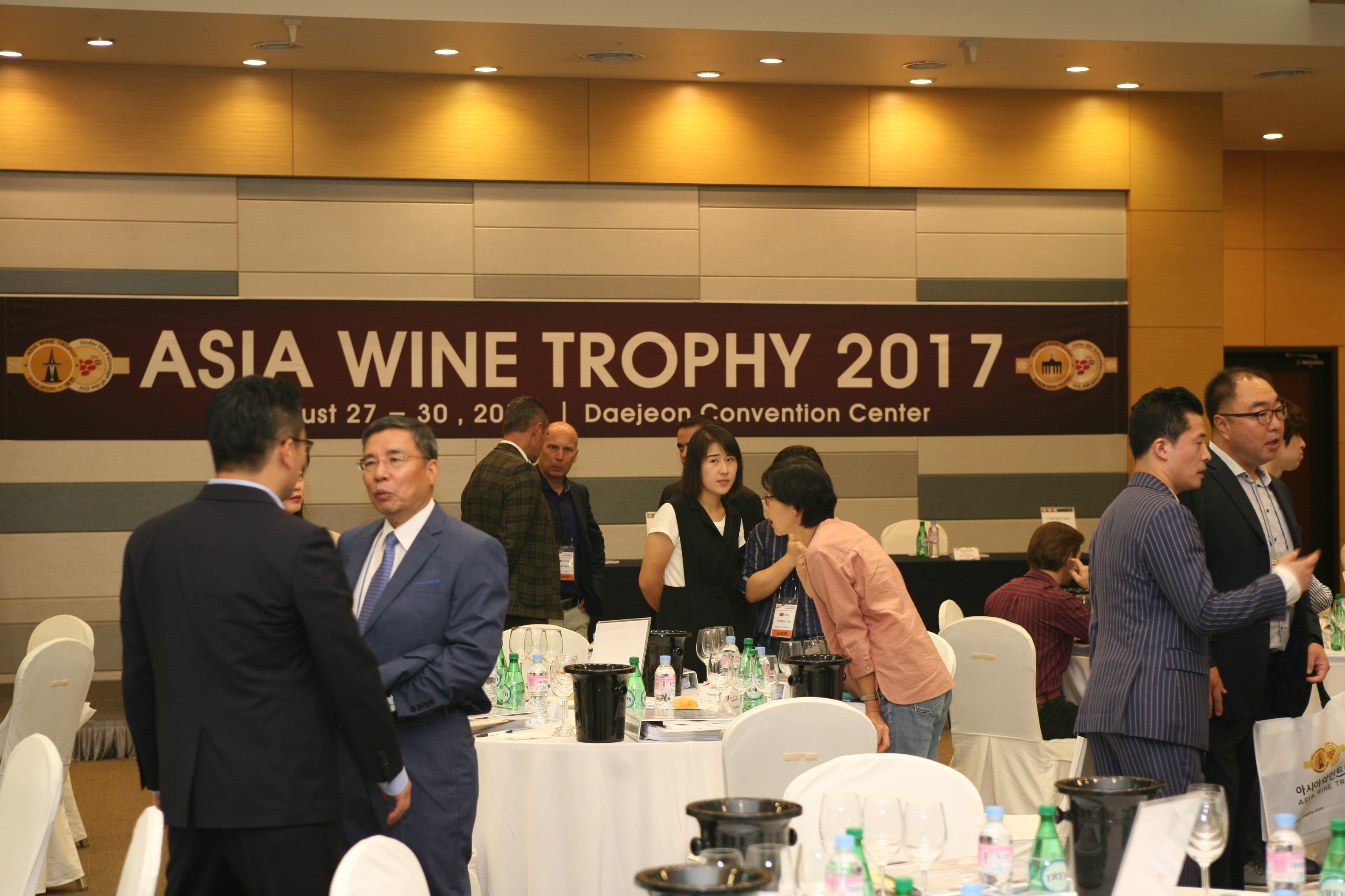 2017 대전국제와인페스티벌 1